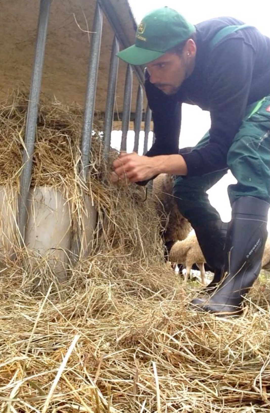 Landwirt versorgt Vieh im Stall, Deutschland